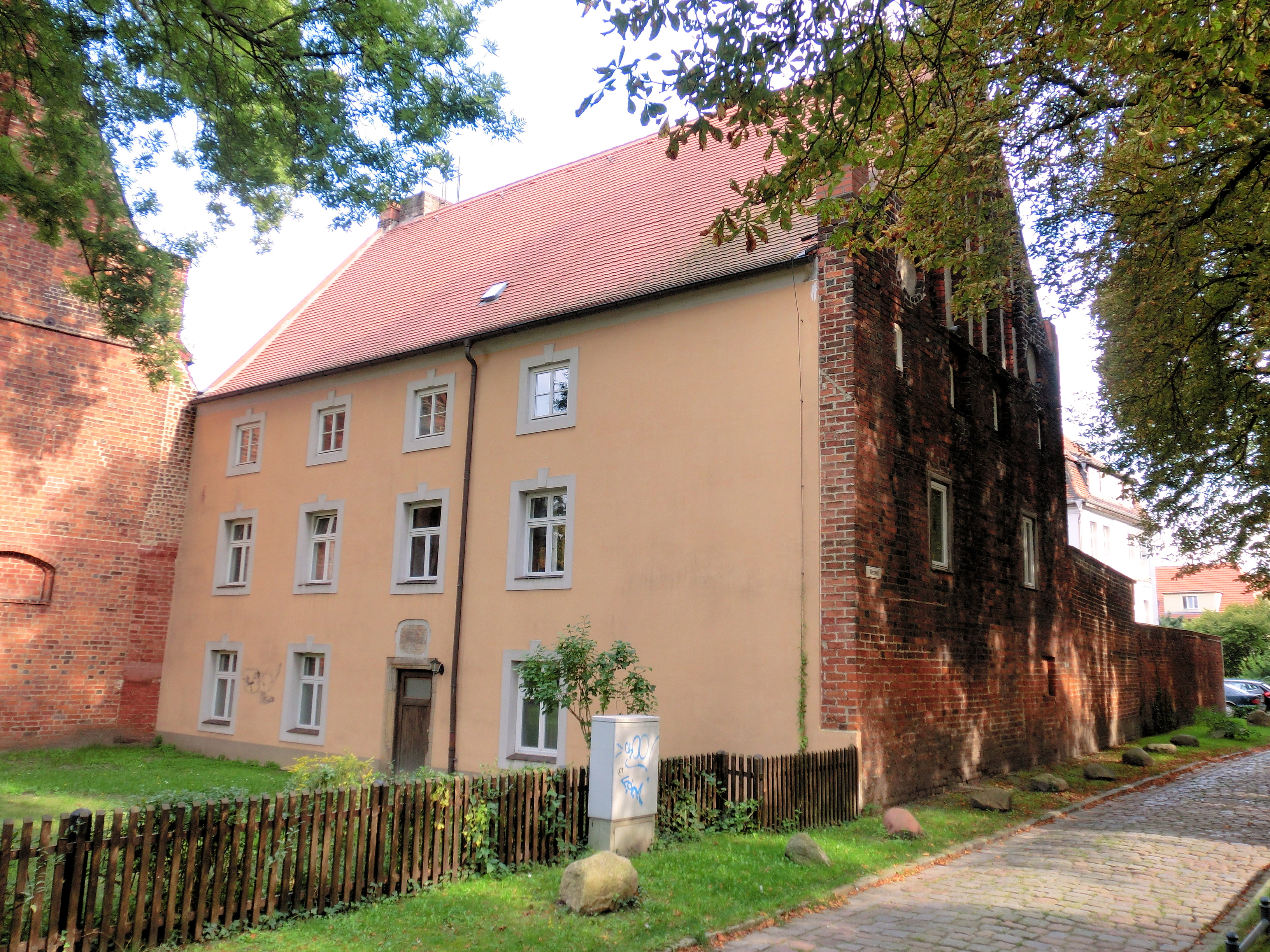 Stendal Mönchskirchhof 4